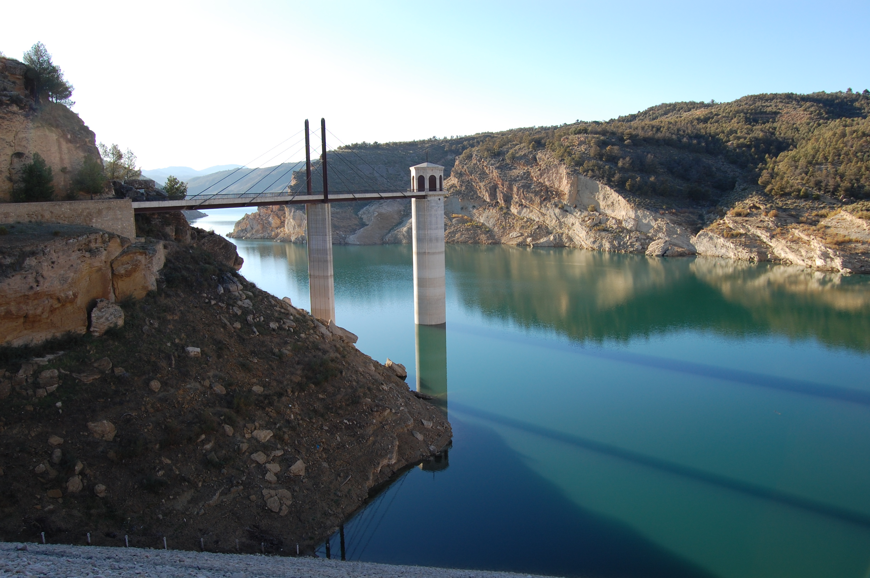 EMBALSE EN MINIMOS